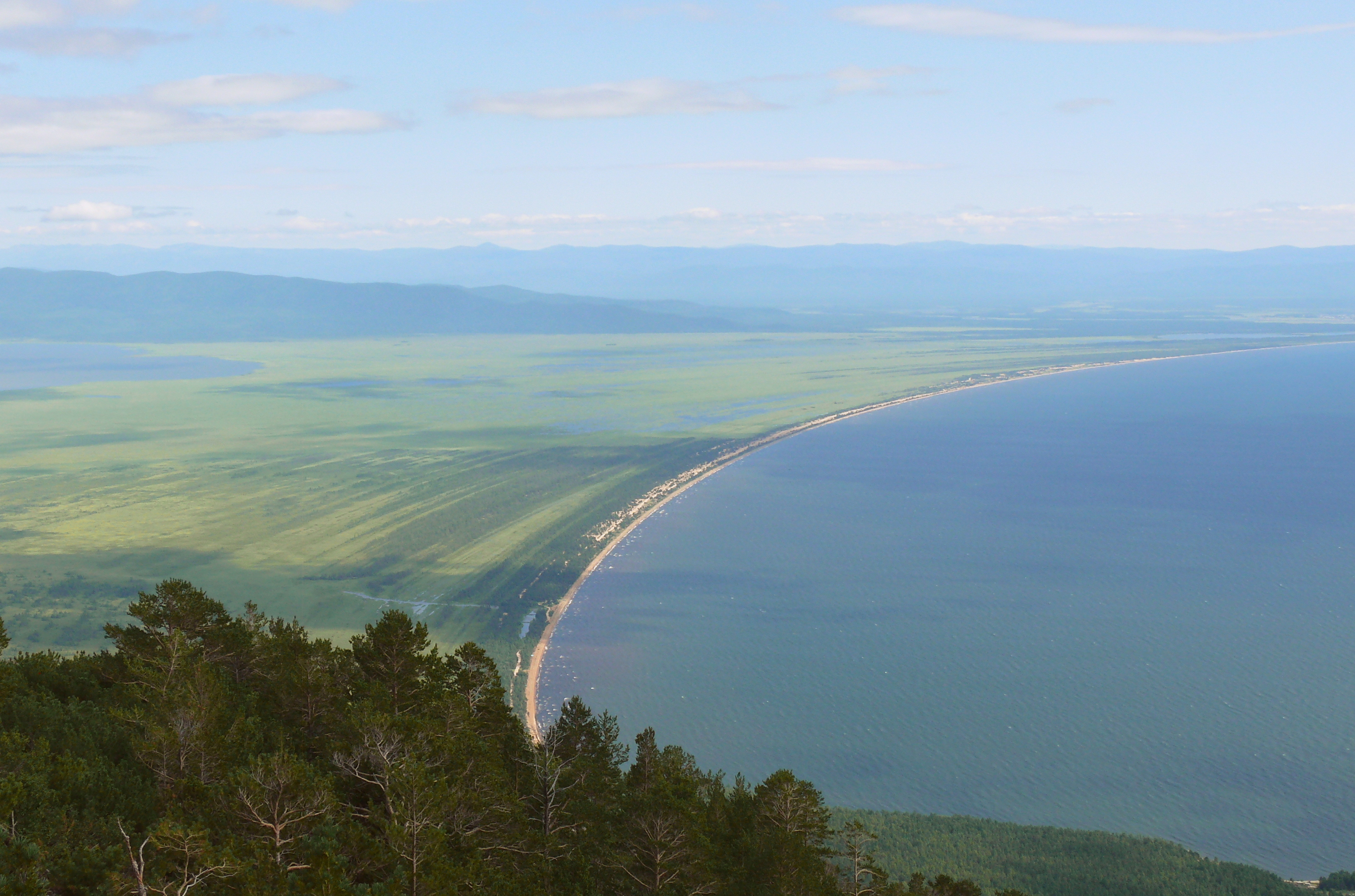 Баргузинский залив Байкала, вид с полуострова Святой Нос. Бурятия